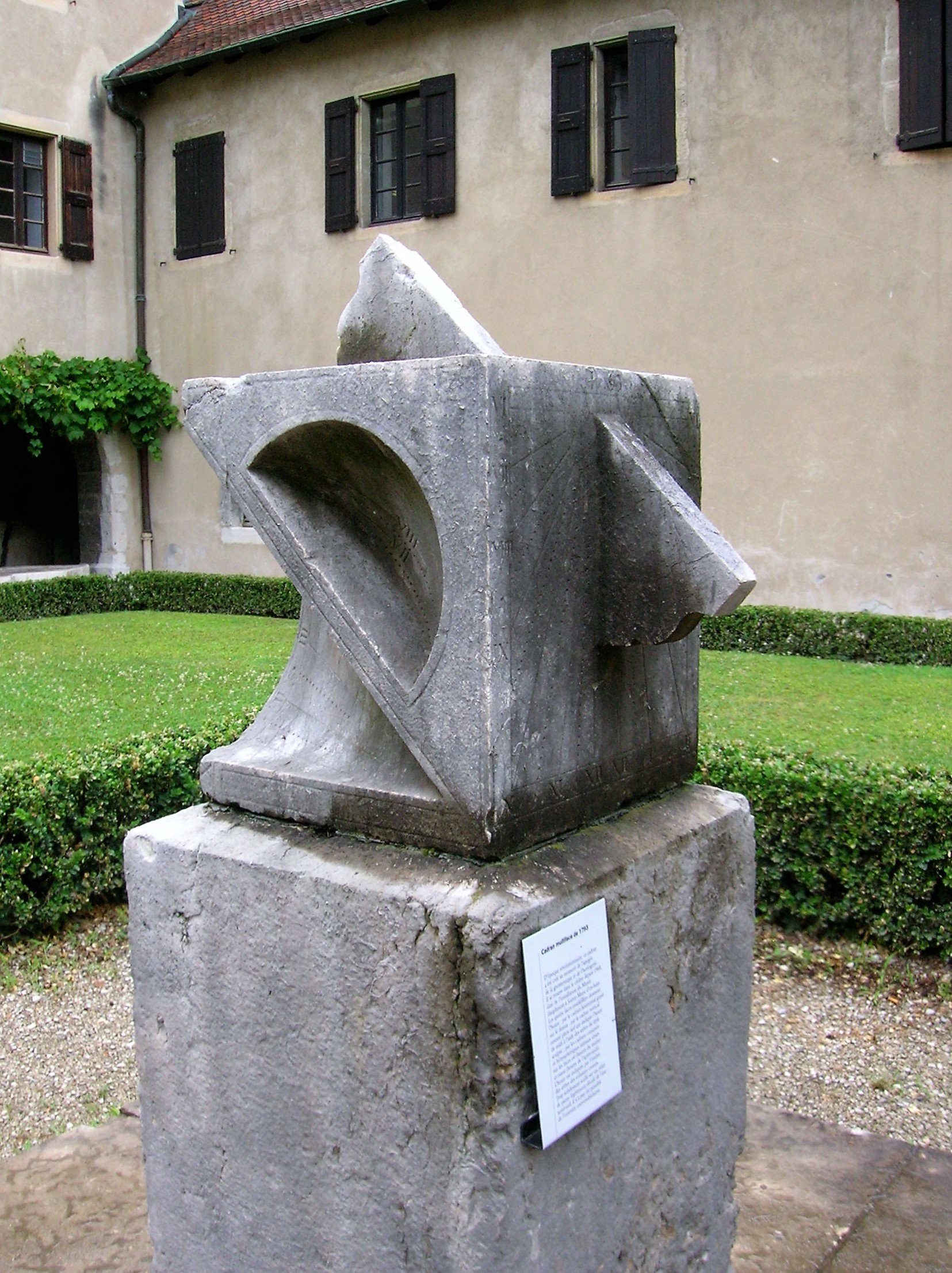 Cadran solaire multiface de 1793 (époque révolutionnaire): cadran horizontal, cadra vertical, cadrans coniques et hémisphériques. Situé dans le cloître depuis 1968. Exposition "Les cadrans solaires en Isère" - Musée Dauphinois - Grenoble.